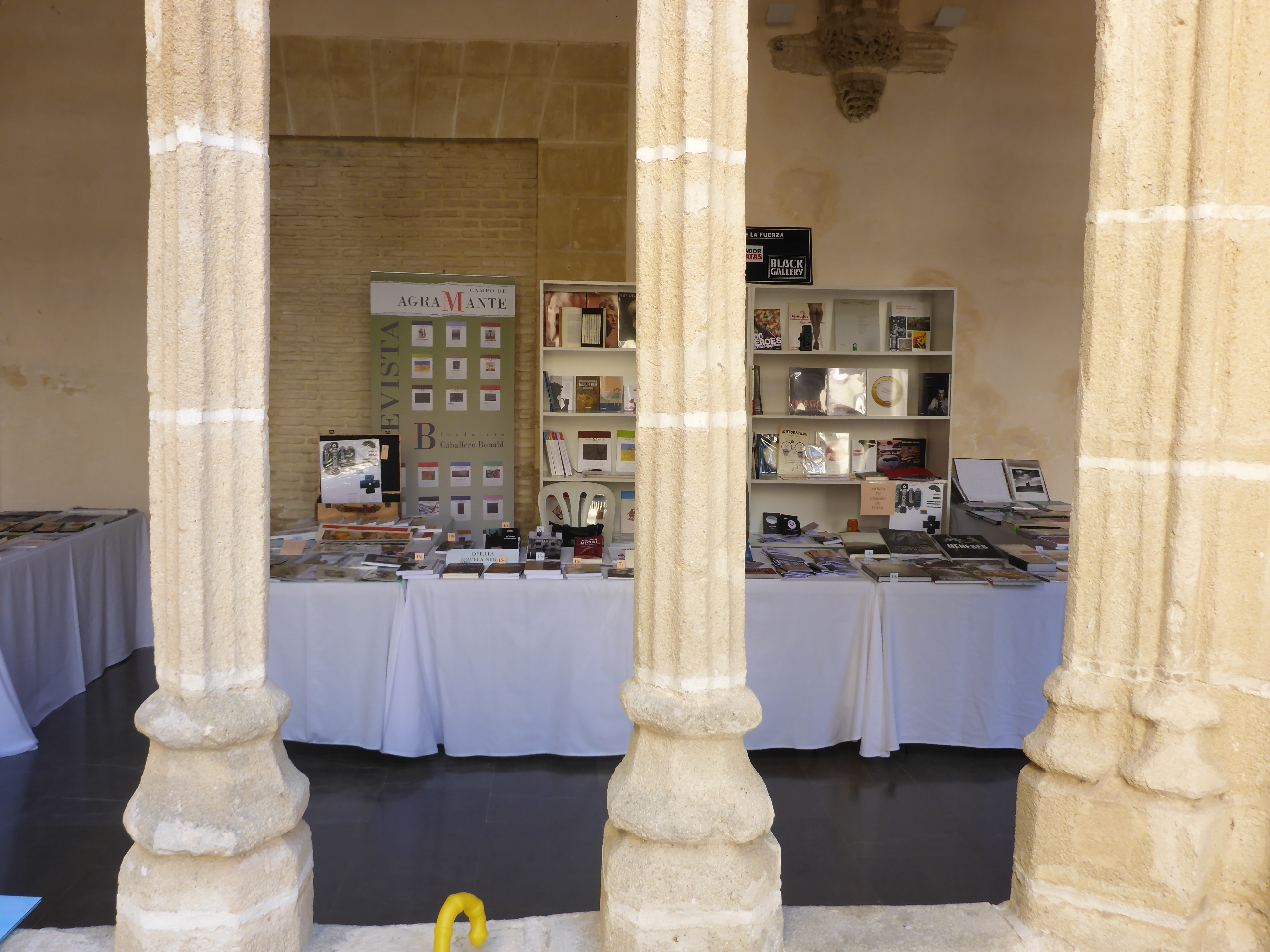 Feria del Libro de Jerez de la Frontera 2016 (Andalucía, España)